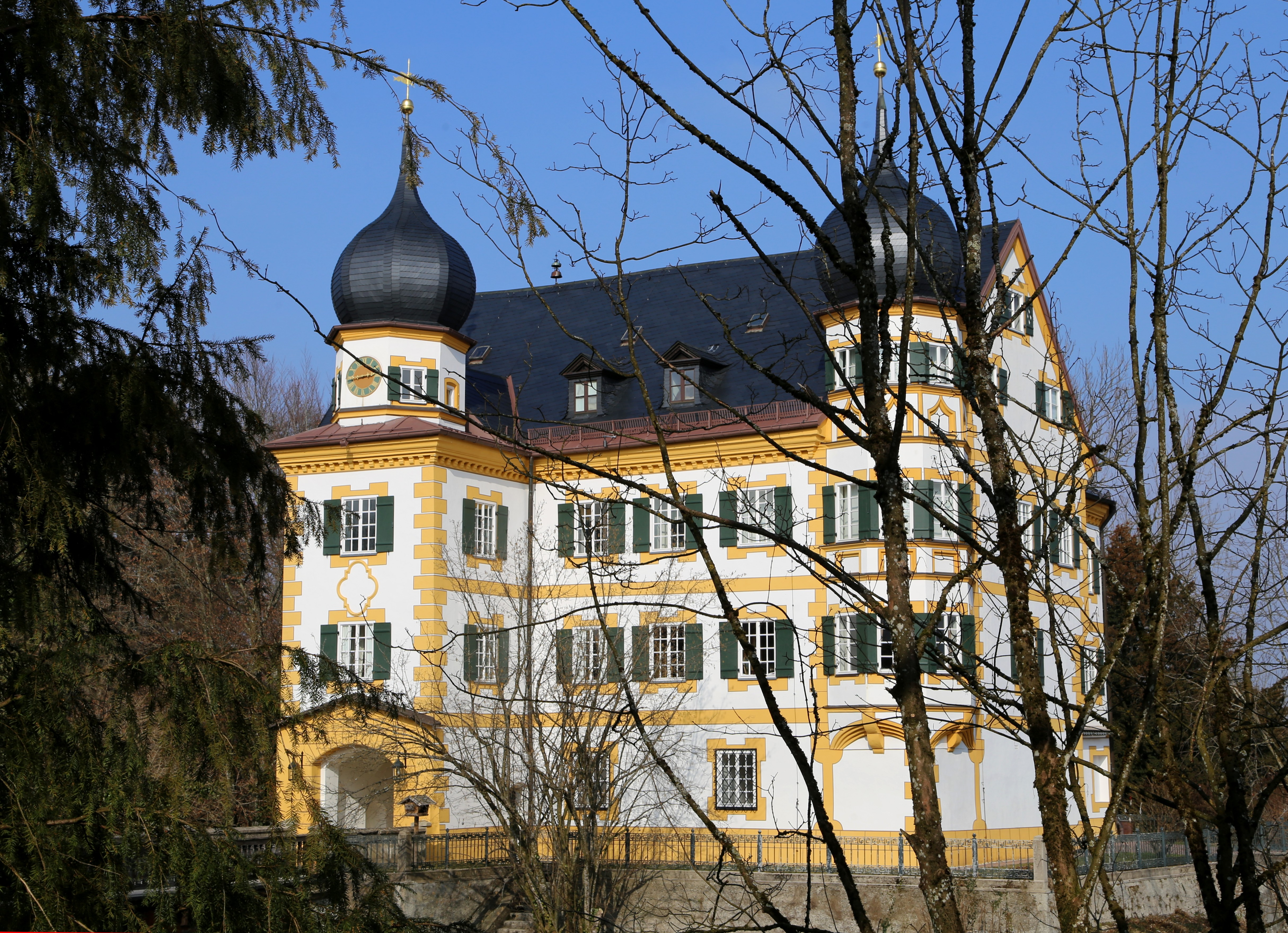 Ludwigstraße 10; Schloss Wildenwart, dreigeschossige Vierflügelanlage um einen Arkadenhof, südwestlicher Torbau mit Satteldach und Torturm sowie südlichem Erkerturm jeweils mit Zwiebelhaube, seit 1200 angelegt, mittelalterlicher Kern nur noch teilweise in Umfassungsmauern erhalten, heutige Baugestalt um 1600, 1689-90 Umgestaltung; mit Ausstattung; Gartenanlage, im Graben der ehem. Burg.